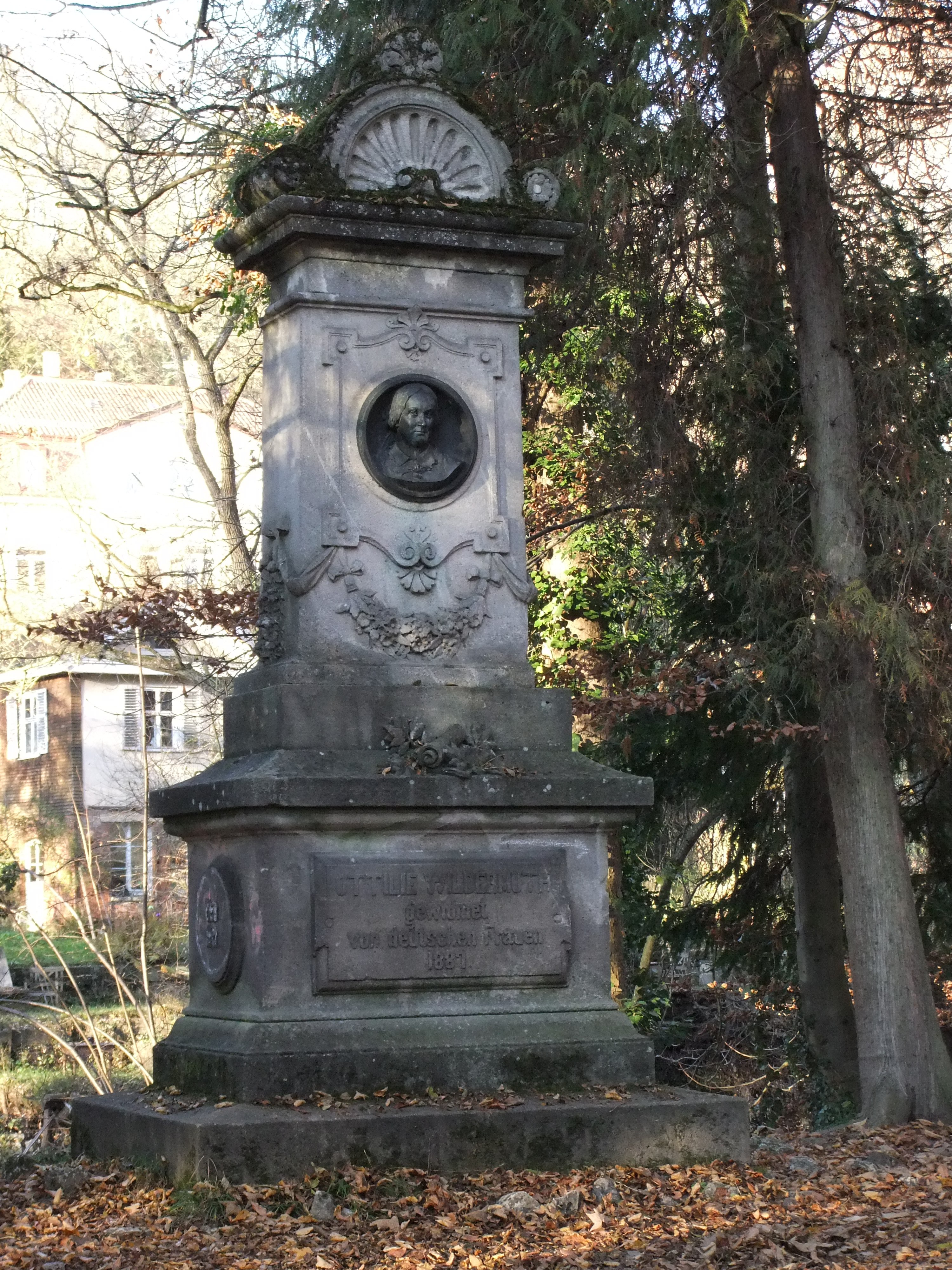 Ottilie-Wildermuth-Denkmal von Wilhelm Rösch auf der Neckarinsel in Tübingen